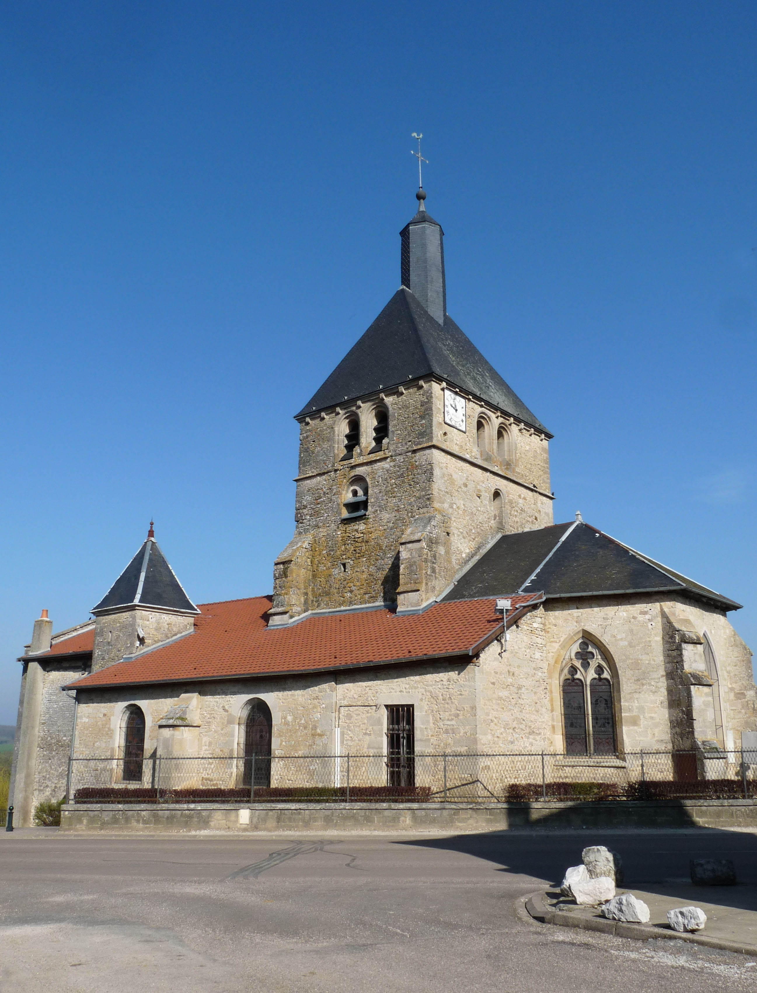 Eglise de Dommartin-le-Franc (Haute-Marne).